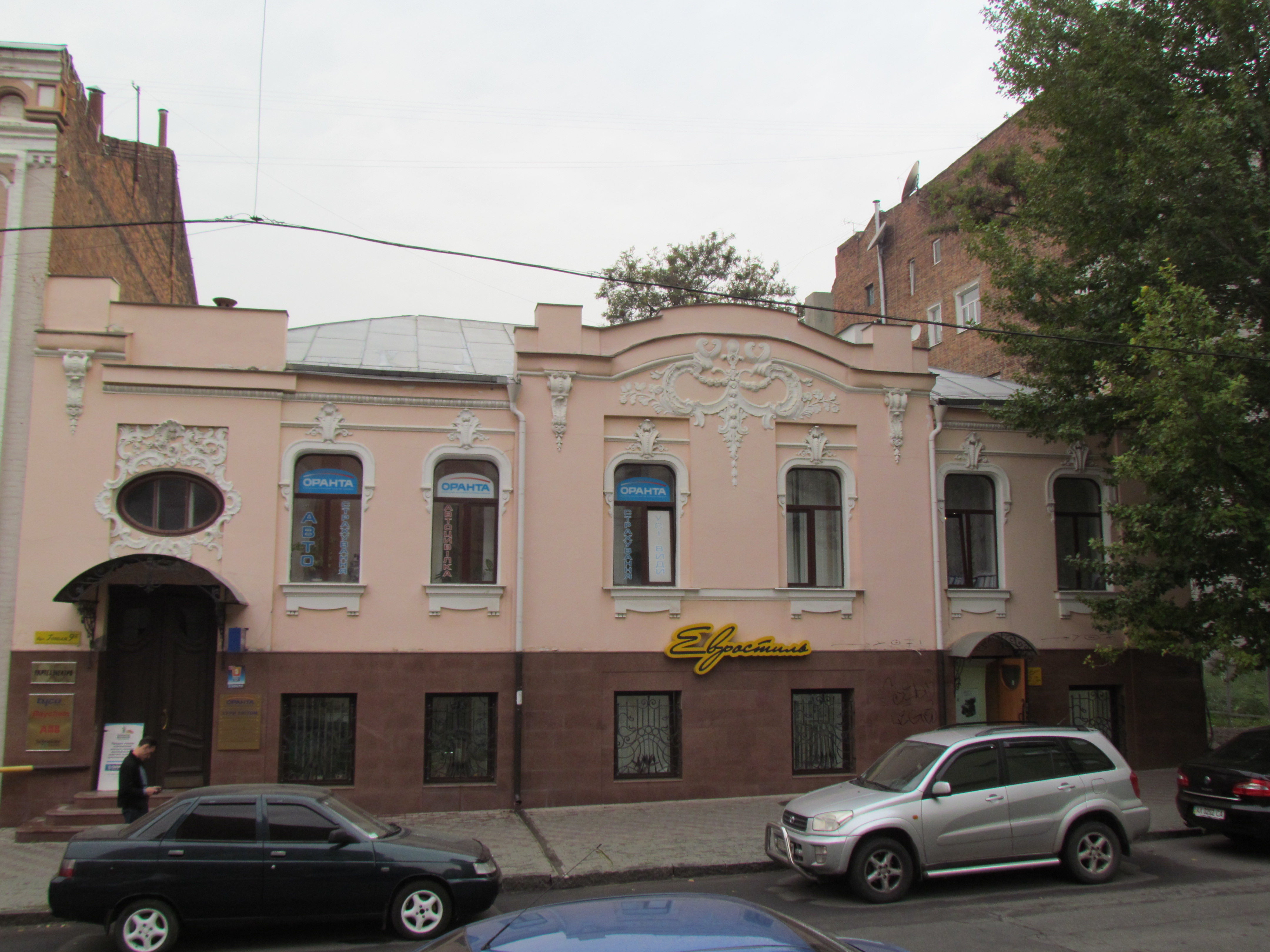 Україна, Харків, вул. Гоголя, 9-б